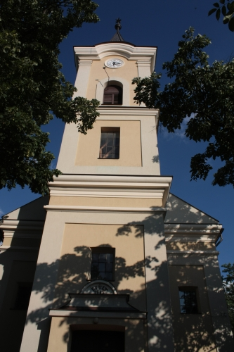 Az orgoványi református templom, Bács-Kiskun megye